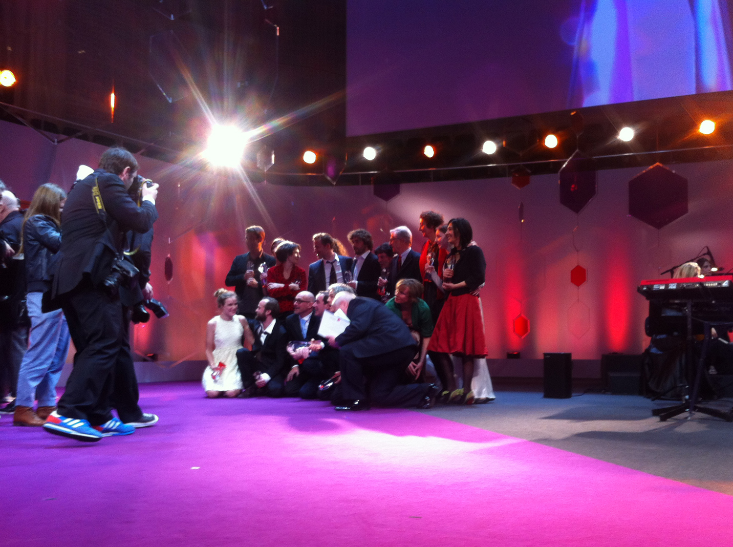 Schweizer Filmpreis "Quartz" 2012 All Winners of the 2012 Swiss Film Prize